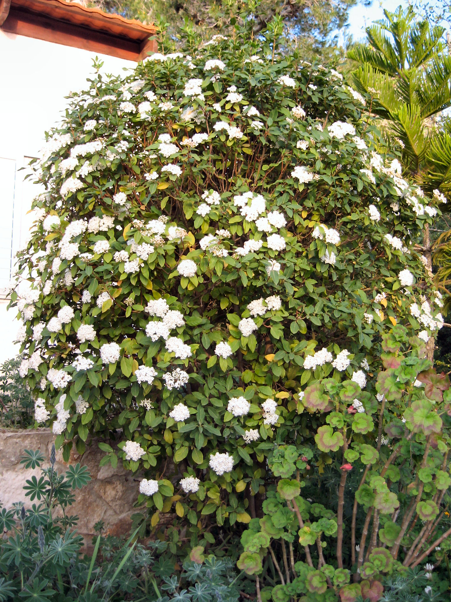 Viburnum tinus